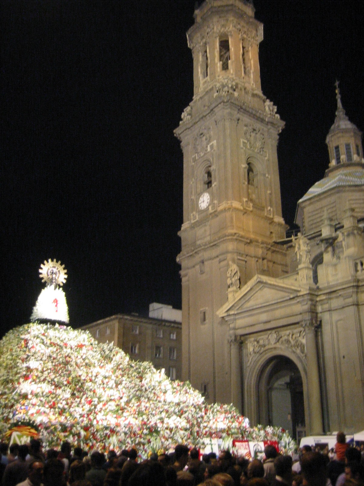 Ofrenda de Flores y Basilica del Pilar, Zaragoza. Autor: Ruben Pamplona Fecha: Octubre 2003